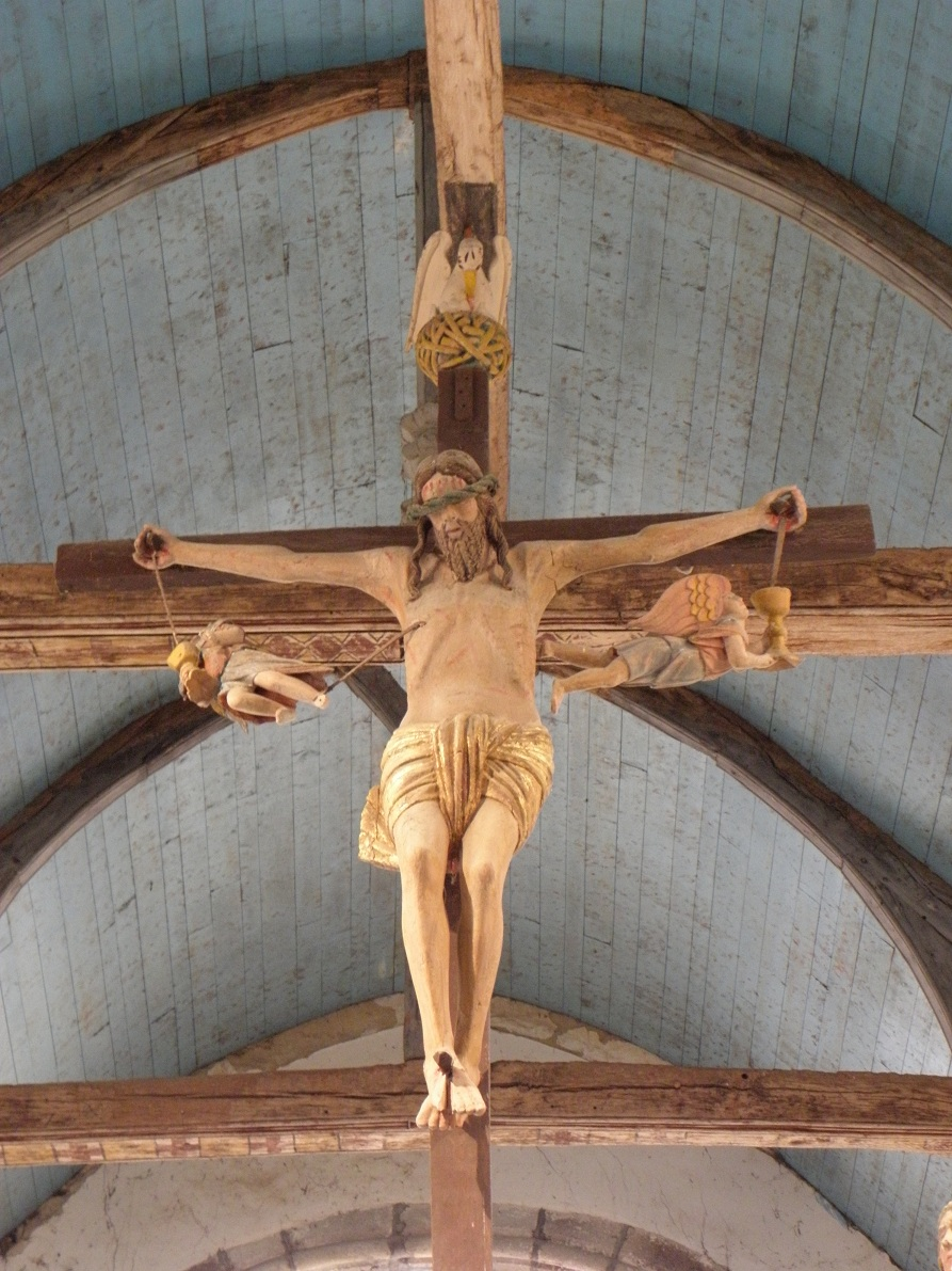 Crucifixion couronnant la clôture de chœur de la chapelle Saint-Herbot en la commune de Plonévez-du-Faou (29). Détail. Christ en Croix.